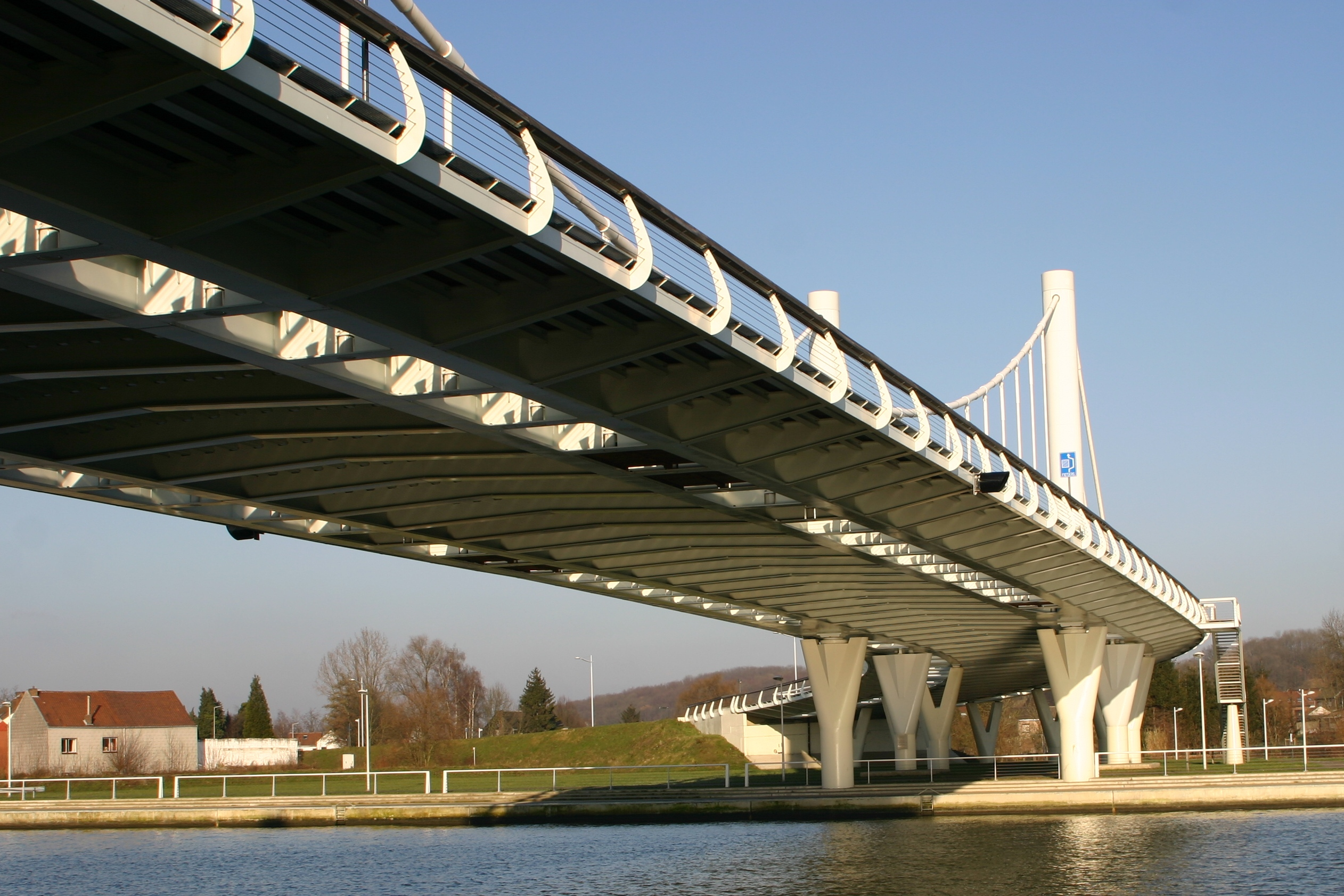 Bréck vu Kanne vue laanscht d'Bréck vun der Hafesäit.